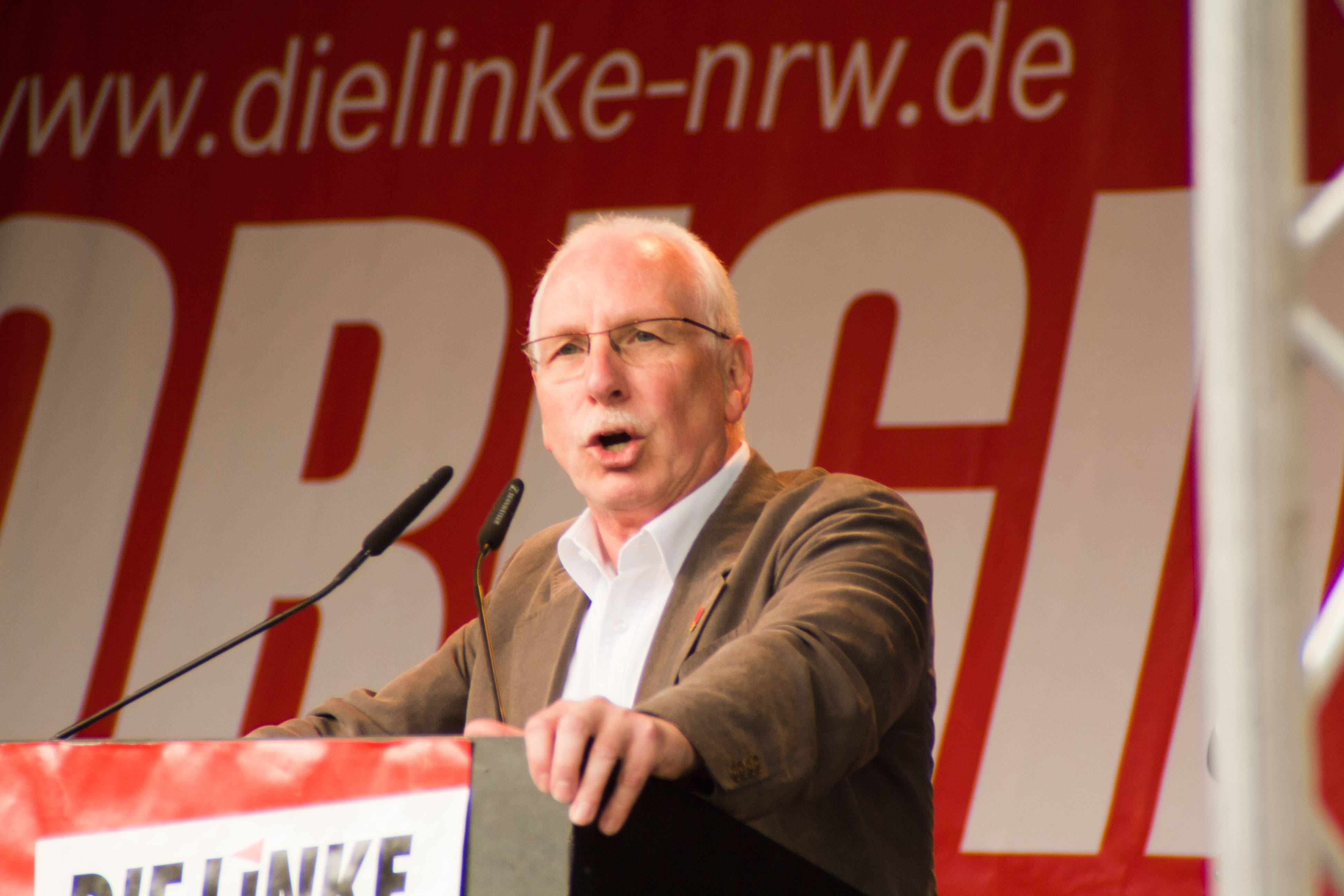 Wolfgang Zimmermann, DIE LINKE, Duisburg